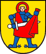 Wappen der politischen Gemeinde Titterten, Schweiz